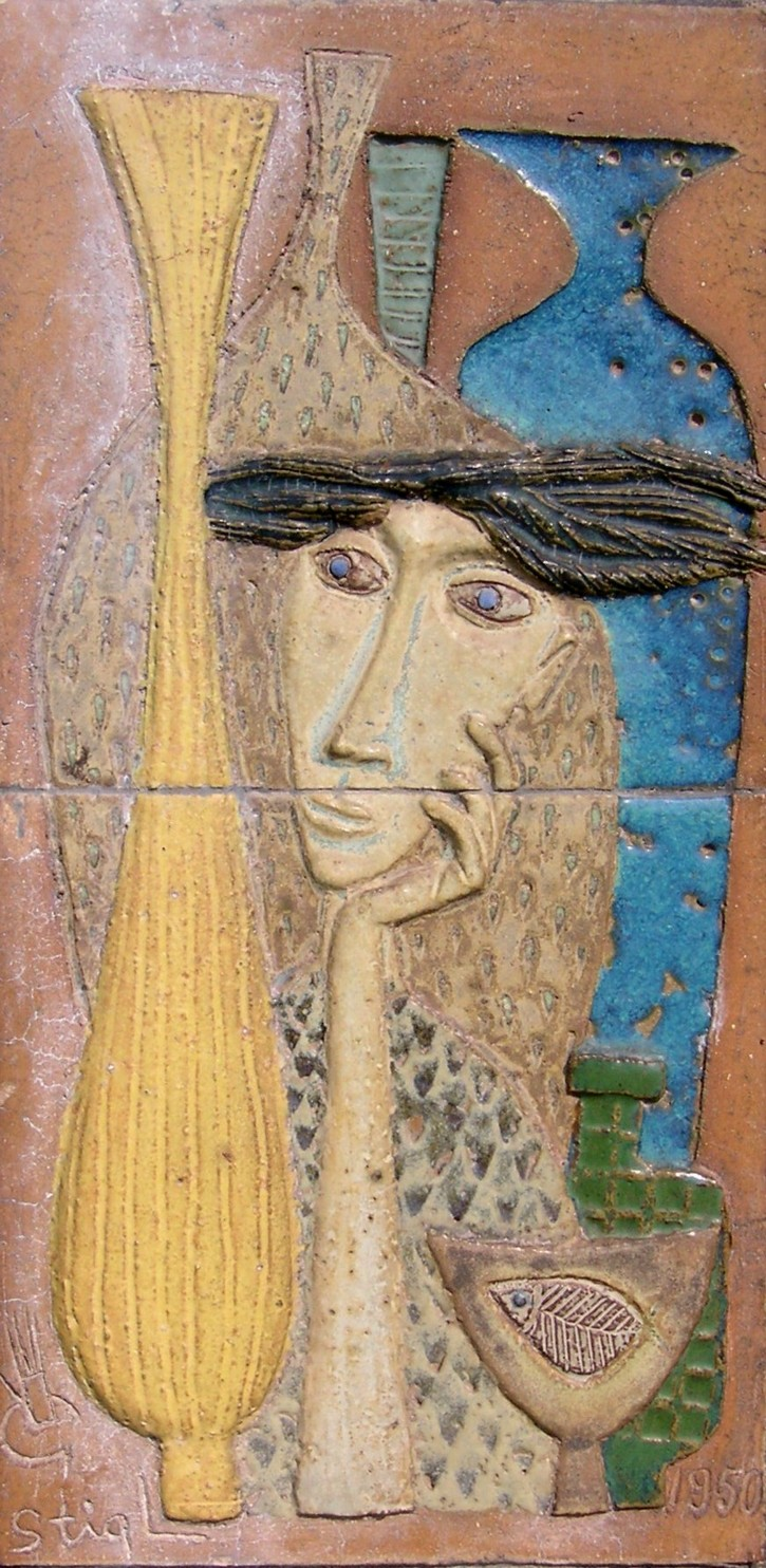 Keramik av Stig Lindberg vid entrén till Gustavsbergs Studio